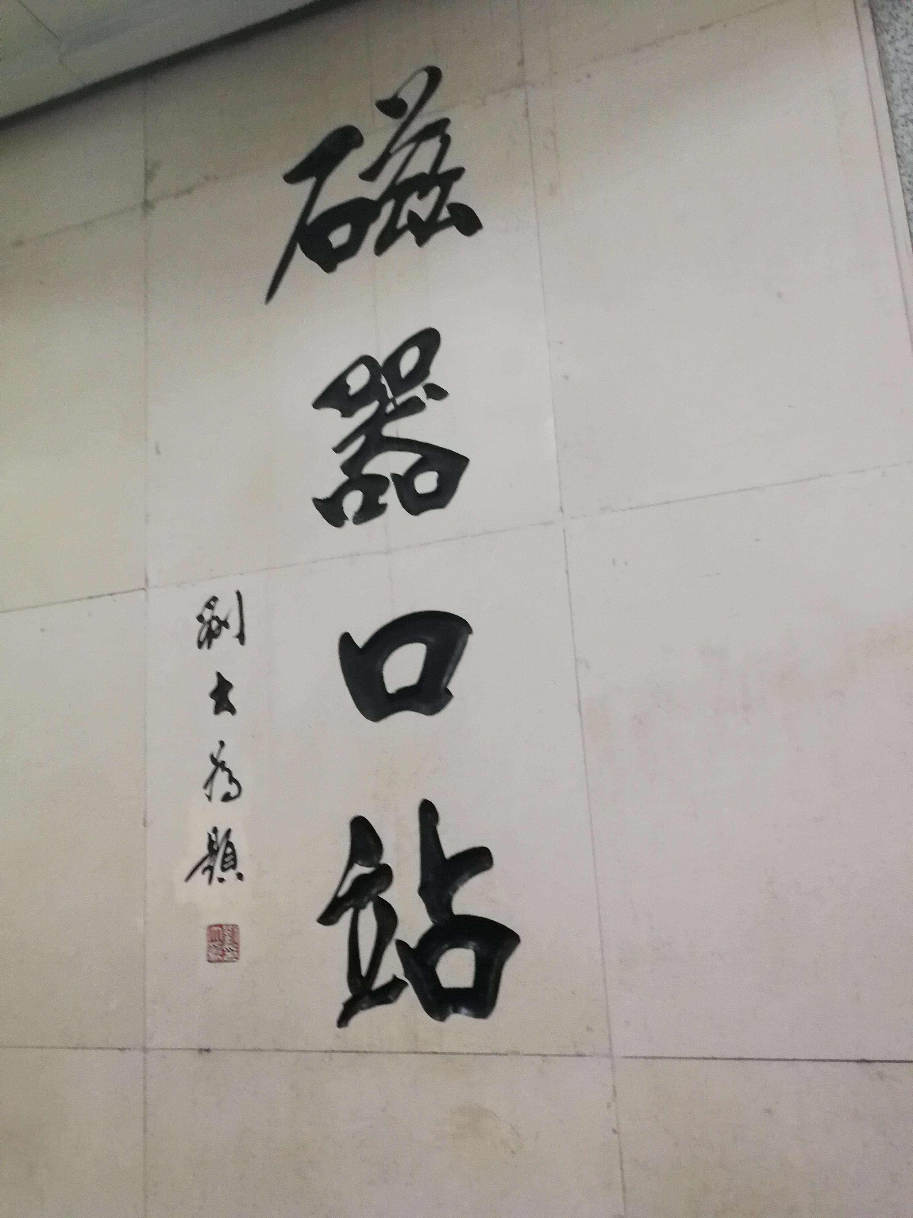 北京地铁磁器口站标识